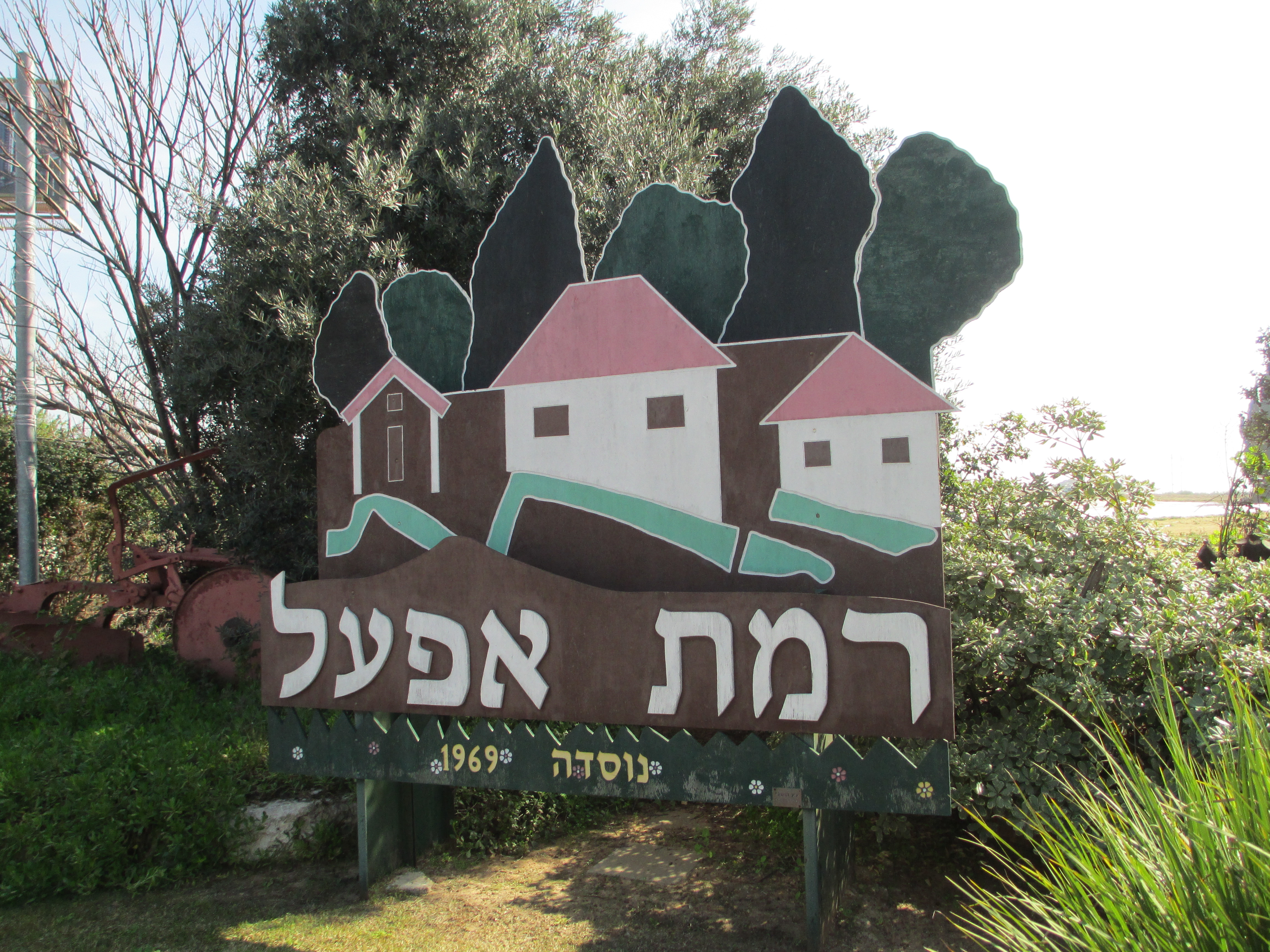 שלט בכניסה לשכונת רמת אפעל ברמת גן